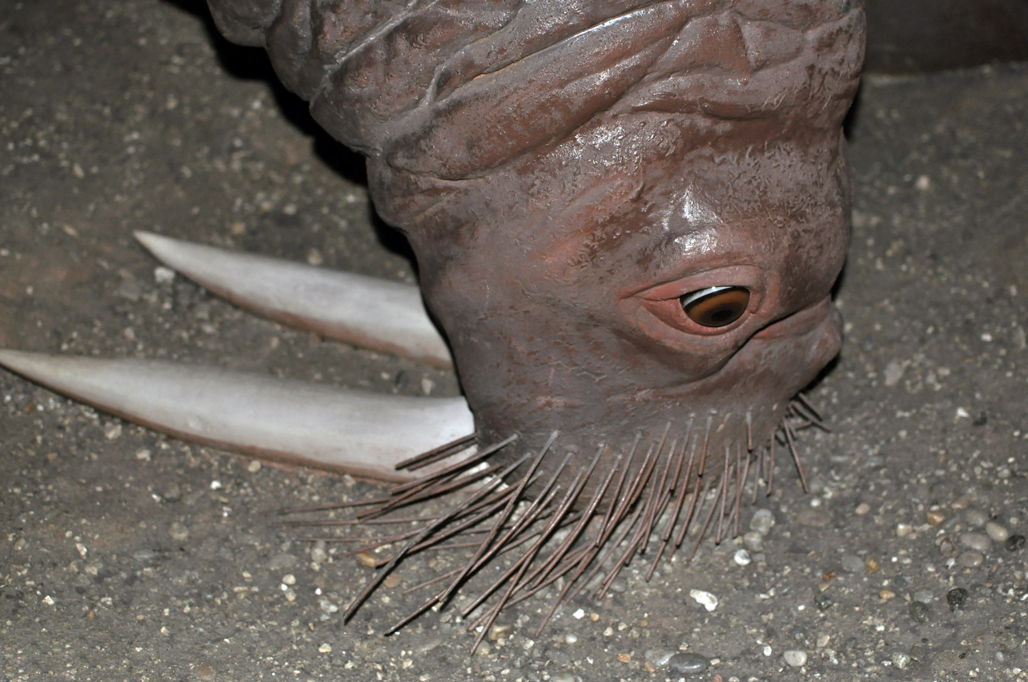 Odobenus rosmarus